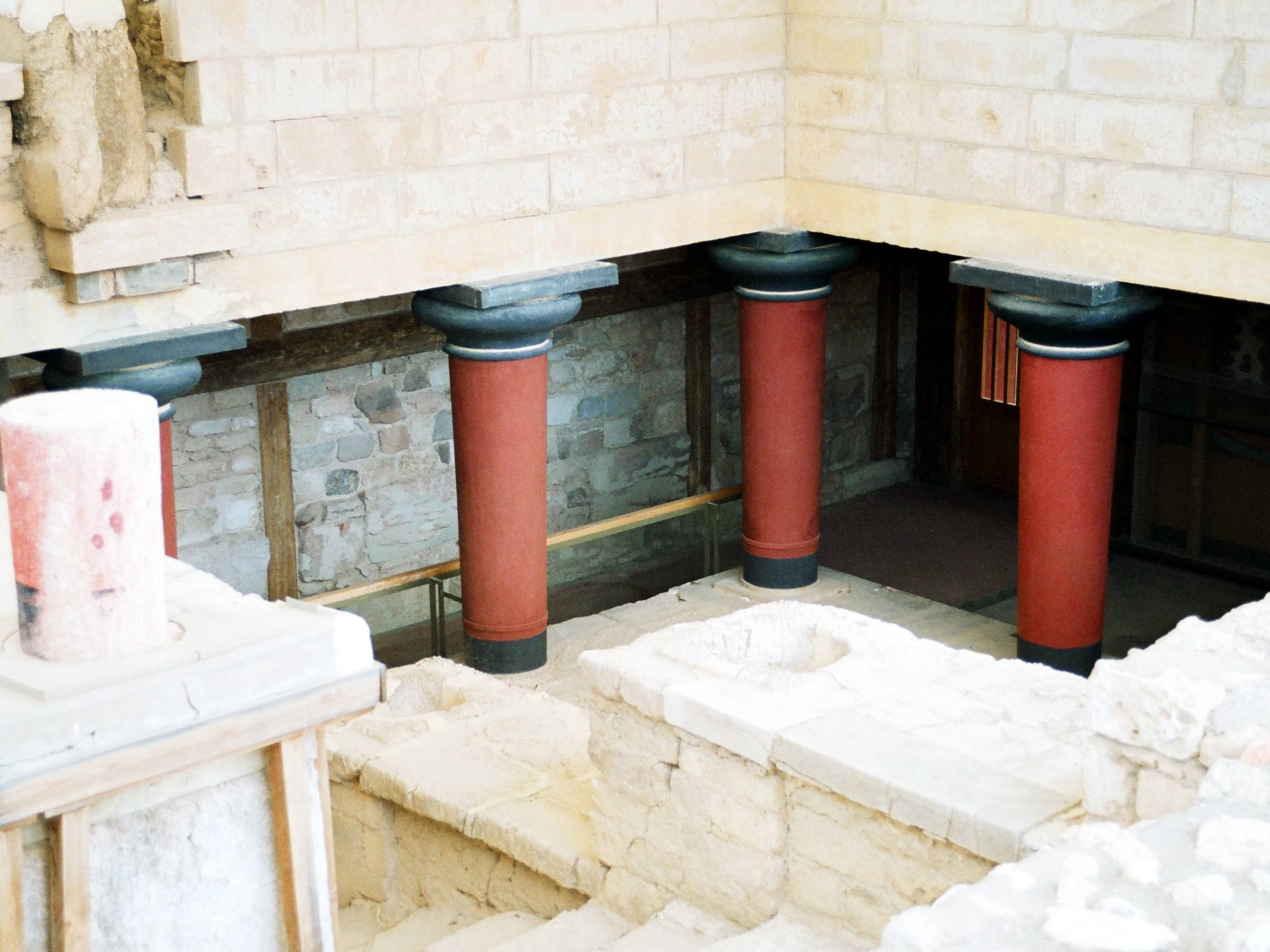 Knossos südlich von Iraklio, Kreta, Griechenland